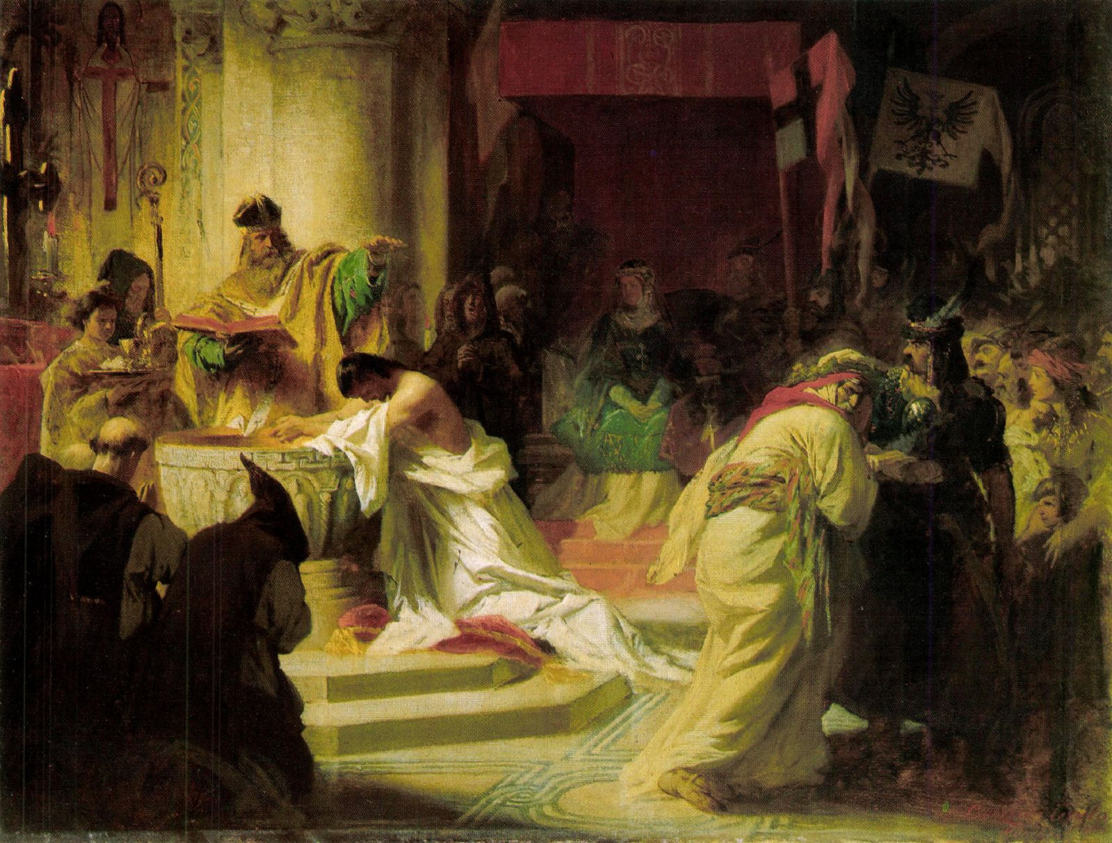 (sketch)